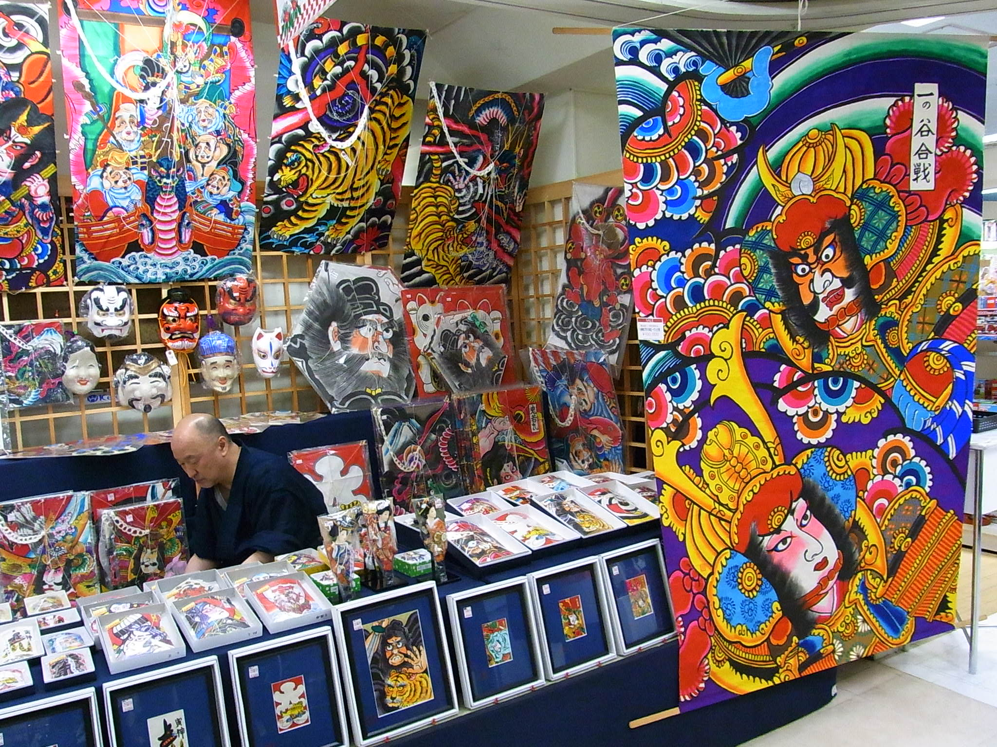 江戸 和凧